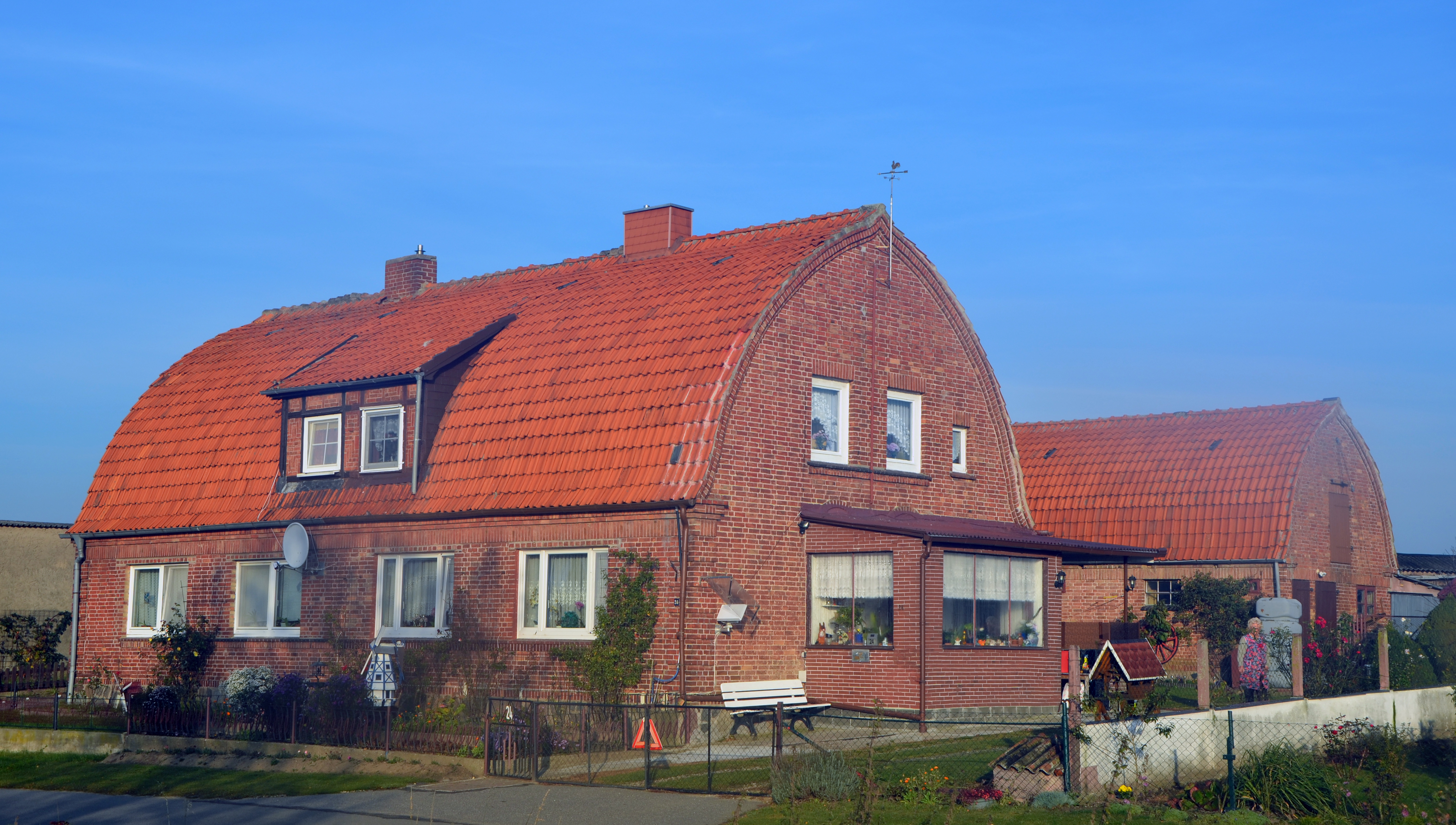 Benitz Dorfstr23/24 - Baudenkmal